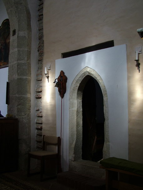 Egyházasdengeleg - Szent Imre templom - belső